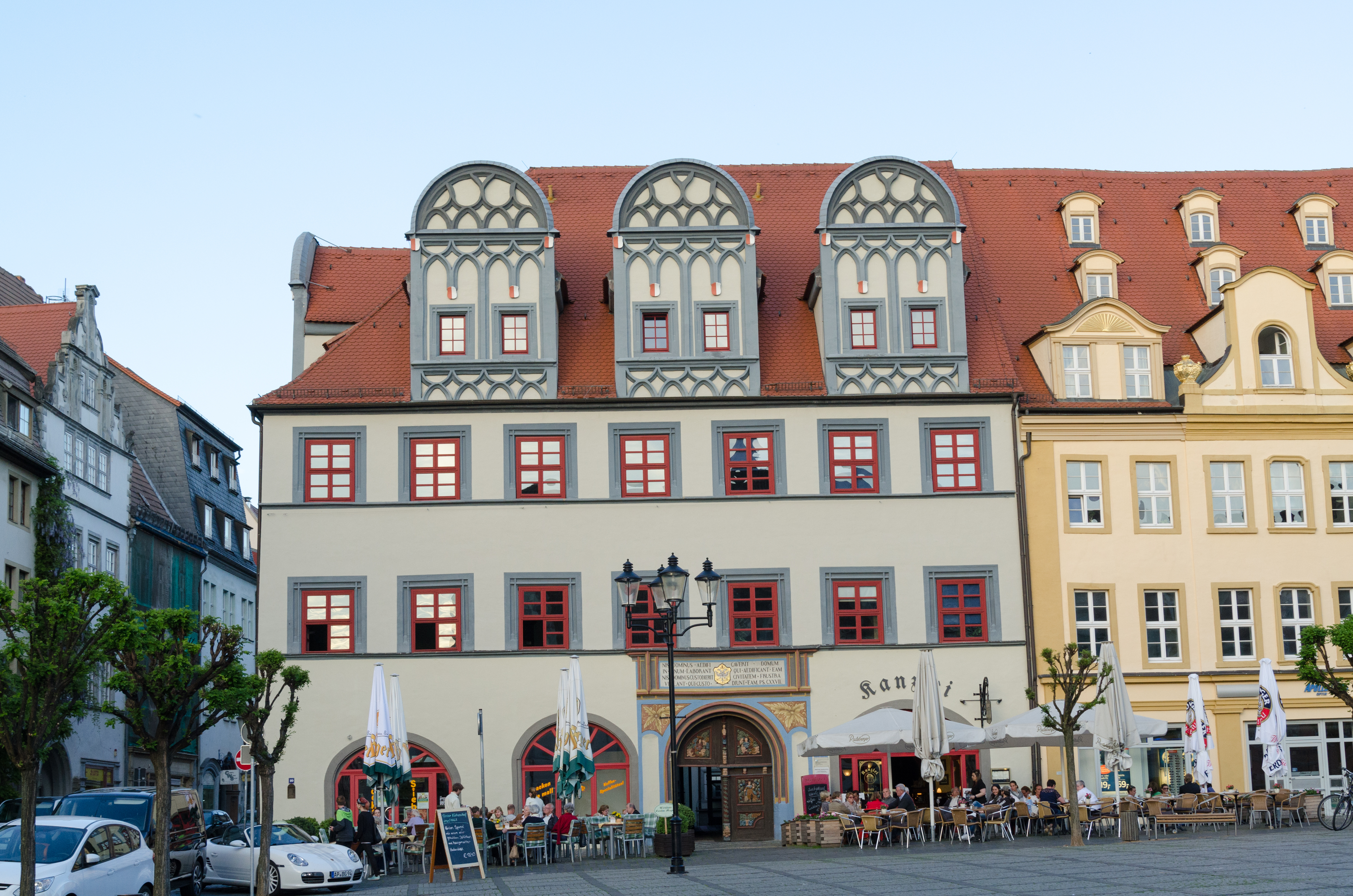 Naumburg, Markt 10